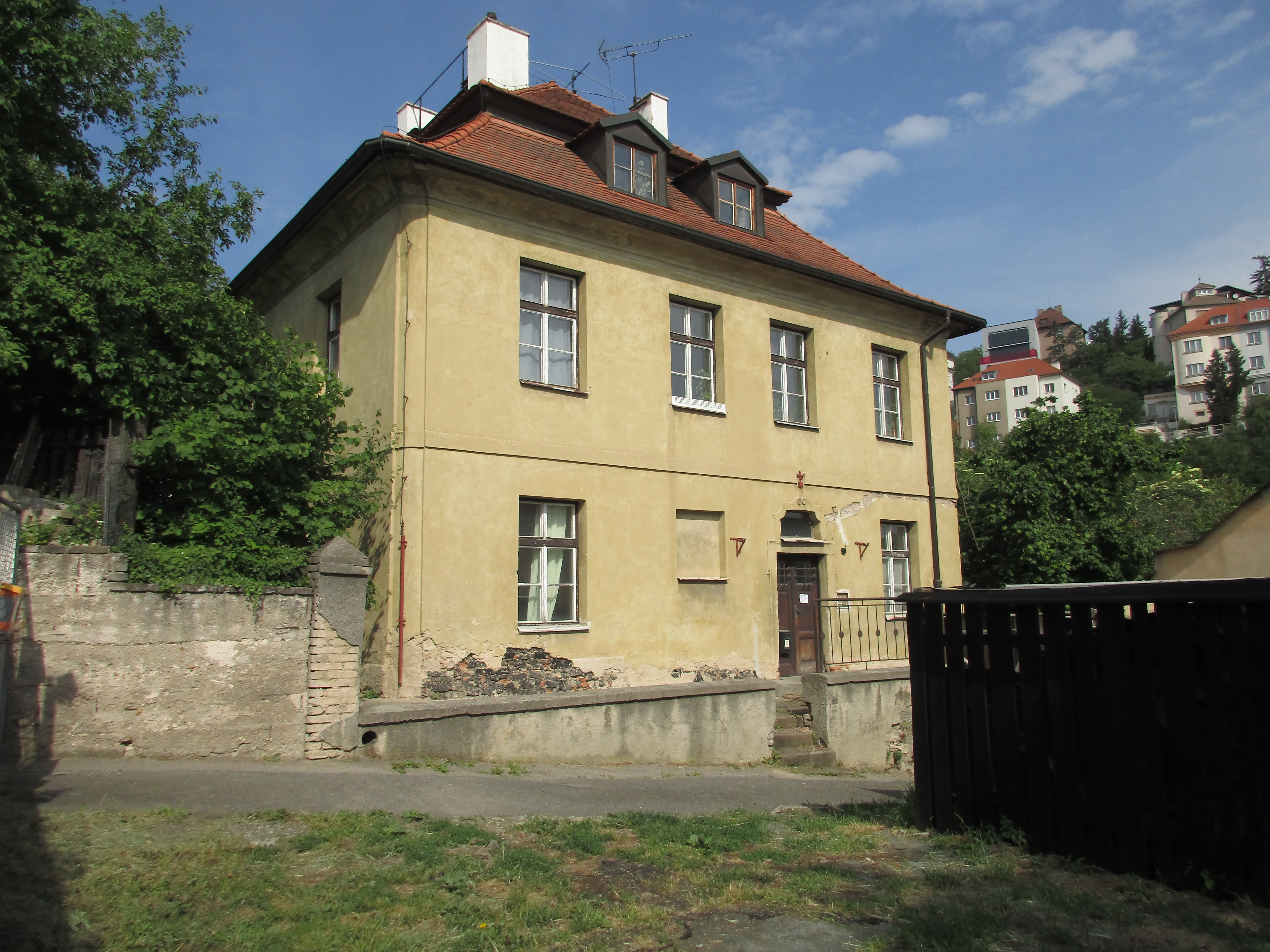 Usedlost Konvářka. Praha 5-Smíchov, Na Konvářce 2917/22, 192/24, 3141/26.